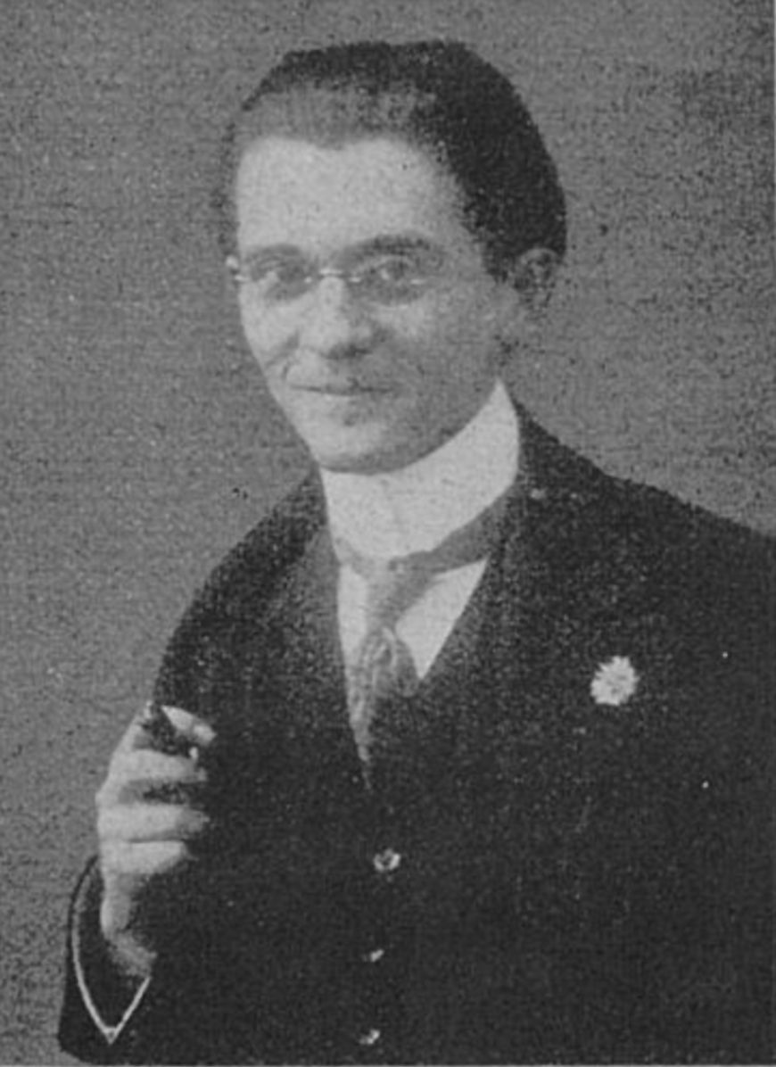 Hans Müller-Schlösser (1913)